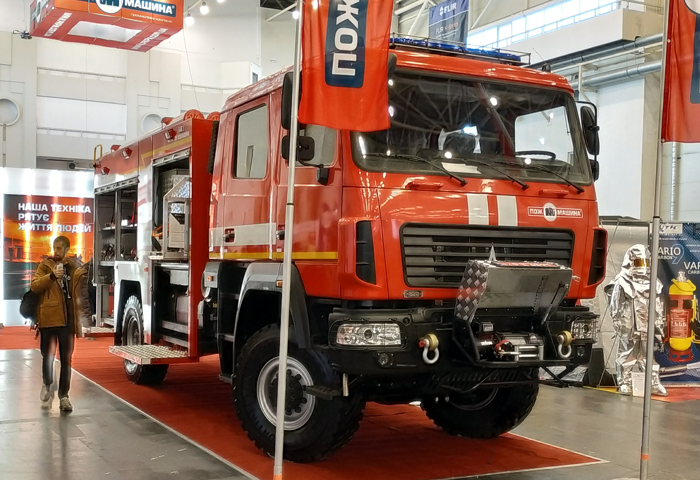 Автоцистерна пожарная АЦ-4-60(530927)-515М на шасси МАЗ-530927 производства ООО "Промышленная компания "Пожмашина" в экспозиции Государственной службы Украины по чрезвычайным ситуациям. Выставка "Зброя та безпека", Киев, октябрь 2018 г.